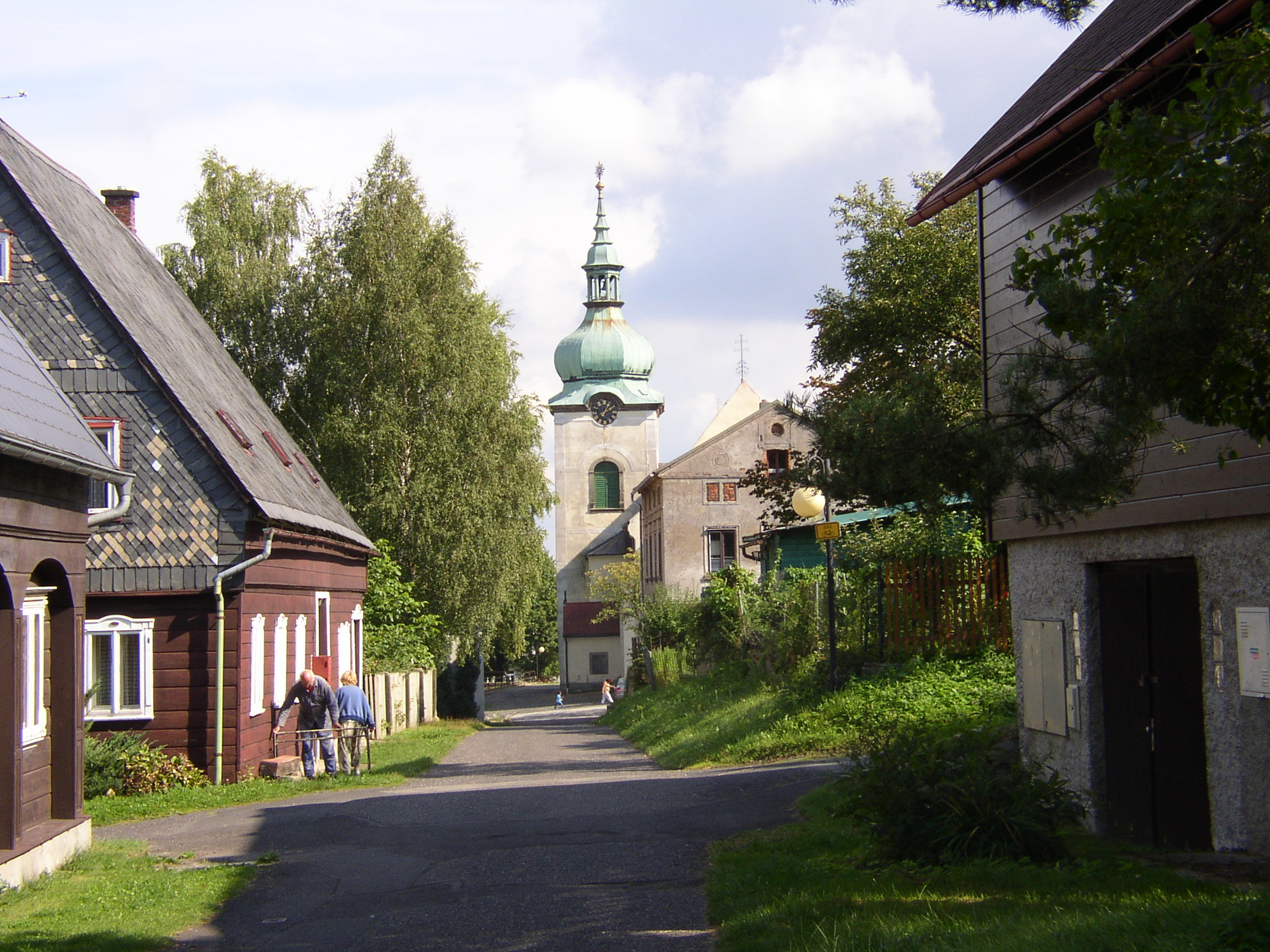 Kostel Nejsvětější Trojice (Jiřetín pod Jedlovou), Jiřetín pod Jedlovou